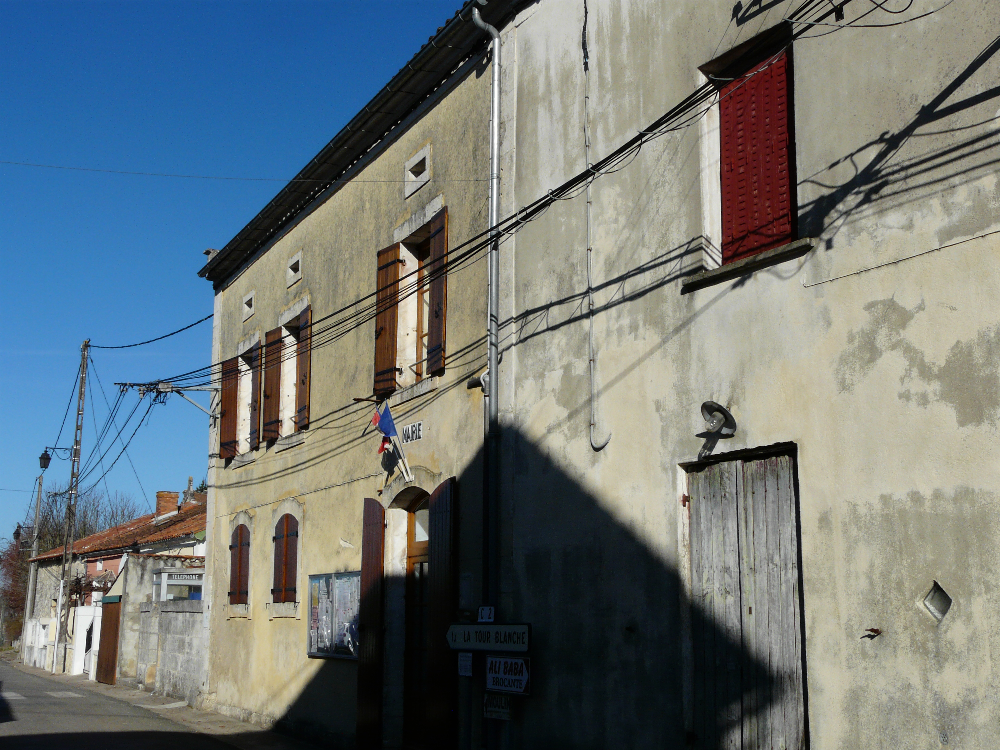 La mairie de Cercles, Dordogne, France.